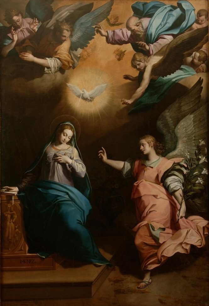 La obra representa el momento en que el Arcángel San Gabriel anunció a la Virgen María que sería la madre de Jesucristo, el Mesías.